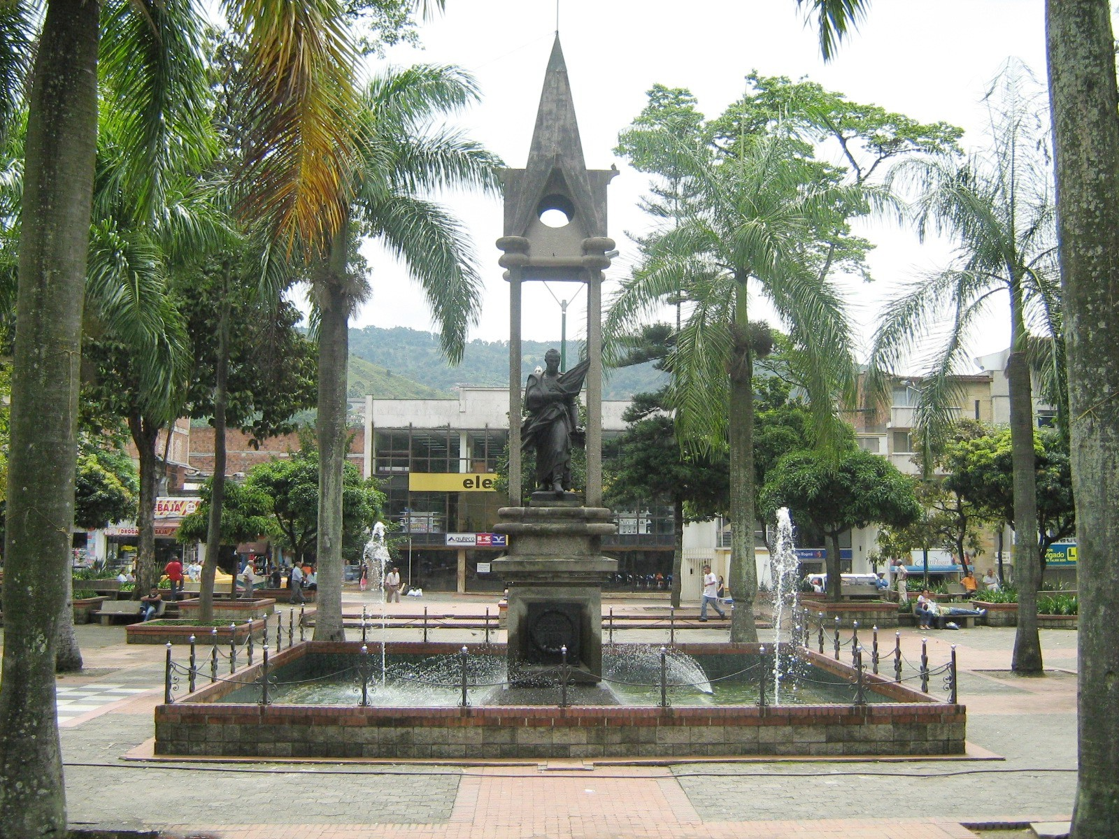 Fuente y estatua de Simón Bolívar, en el parque Principal del Municipio de Itagüí, Colombia. La Estatua de bronce del Libertador Simón Bolívar, obra de Hans Mayr Muchen.